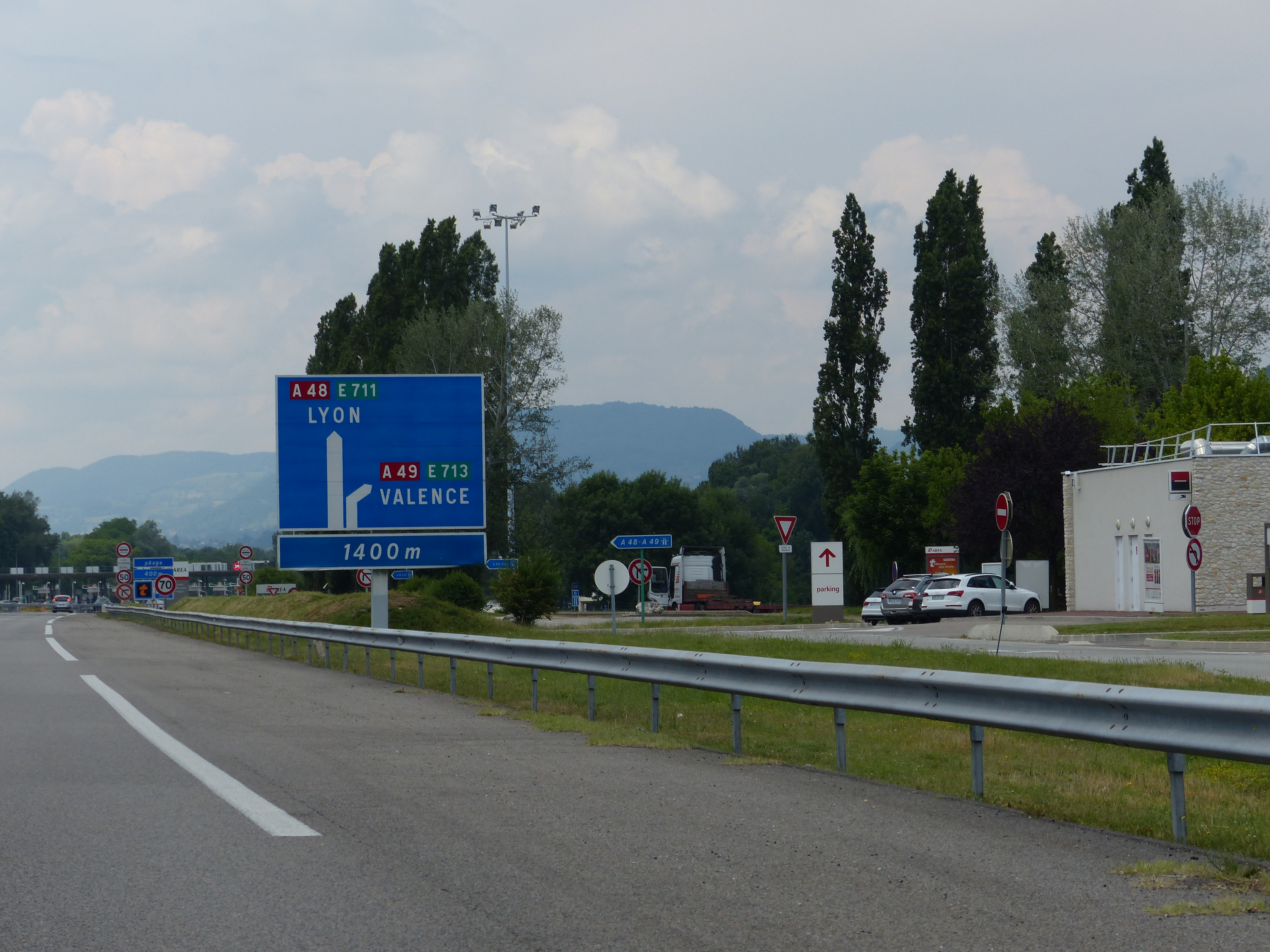 Panneau Da52a 1400 m A48-A49, autoroute A48, Voreppe, Isère, France.